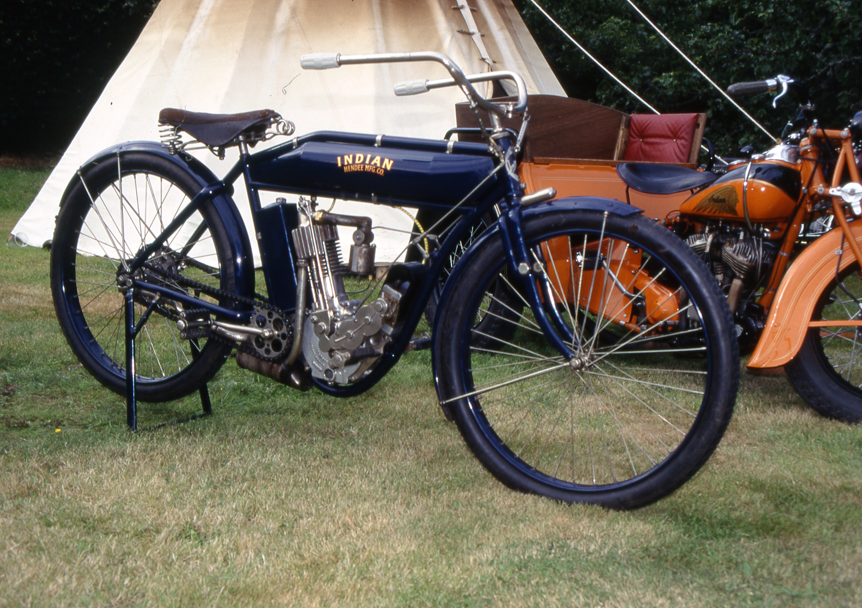 Indian Single 40A von 1909, 490ccm, wechselgesteuert. Aufgenommen beim Indian-Treffen 1995 in Schottland